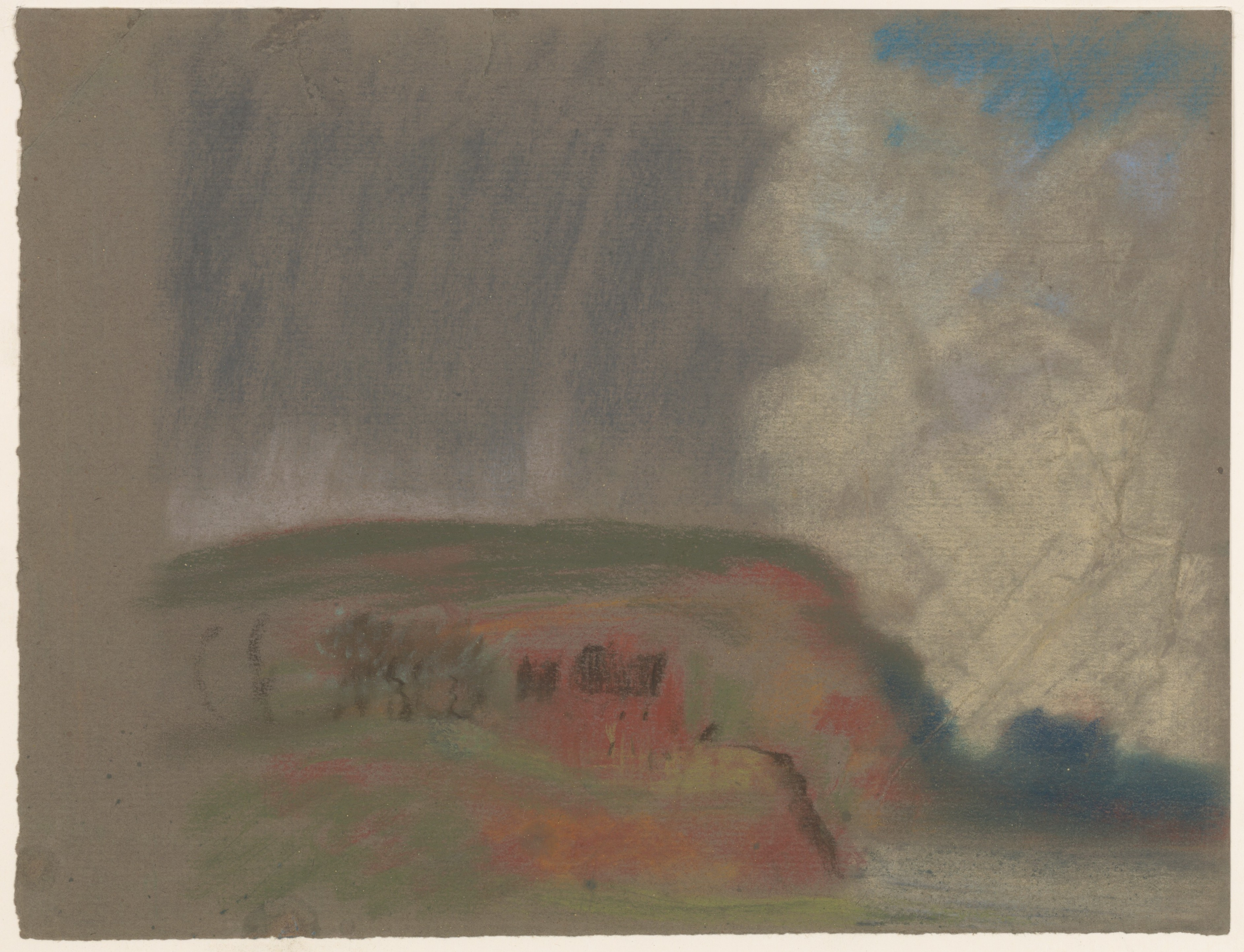 Drawing; Drawings